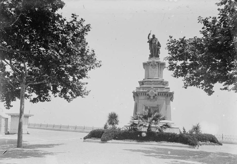 Imatge